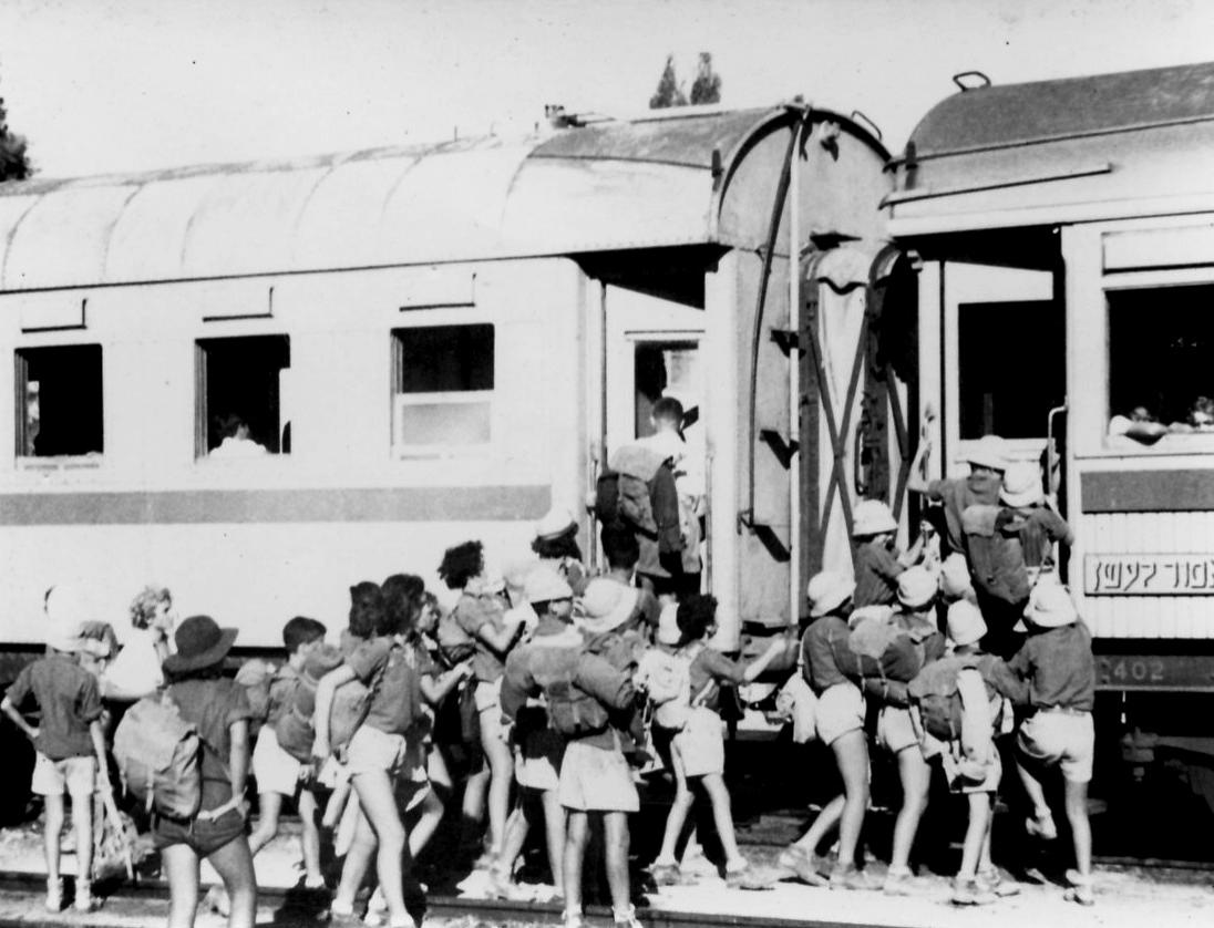 קבוצת נשר בנסיעה ברכבת לטיול 1950-2.